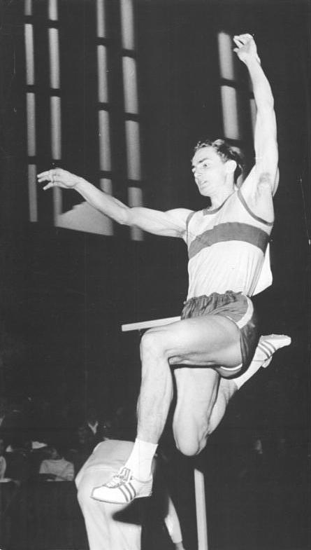 Siegfried Dähne Zentralbild Wendorf Ma-wpt 13.2.1966 Berlin: Deutsche Hallen-Leichtathletik-Meisterschaften der Junioren am 13.2.1966 in der Berliner Dynamo-Sporthalle. Im Vorkampf der Weitsprung-Konkurrenz erreichte Siegfried Dähne (SC Leipzig) 7,21 m.